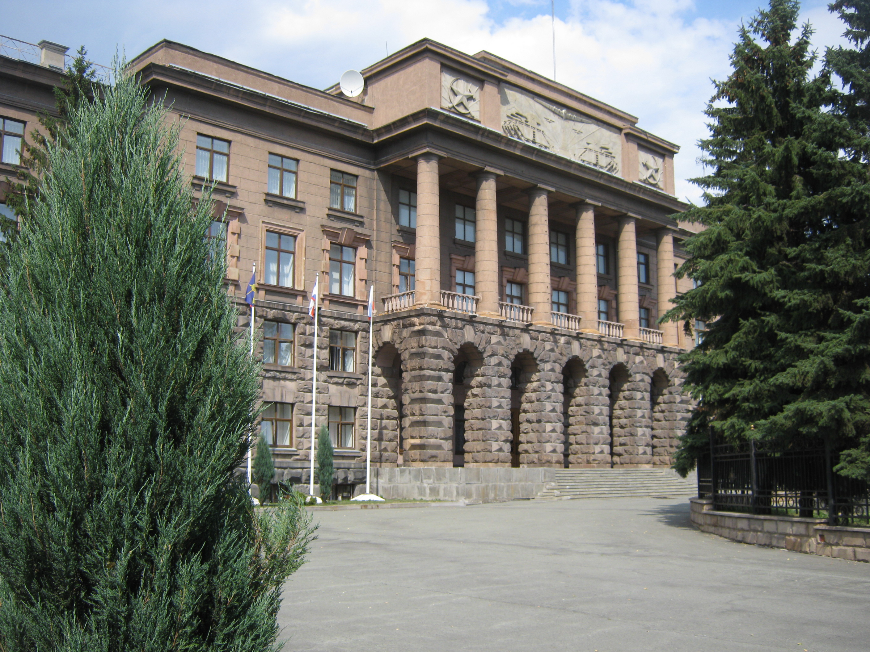 Штаб ЦВО